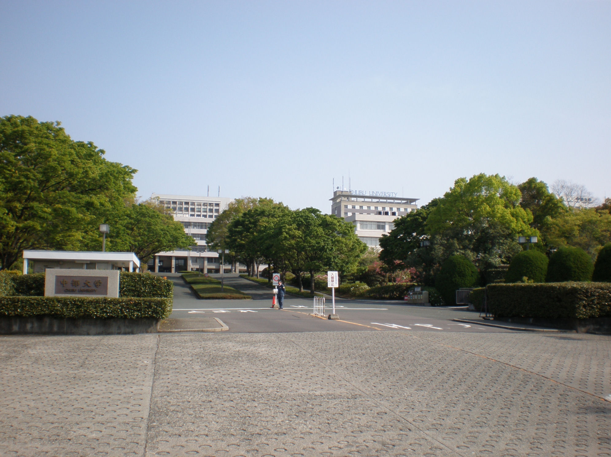 愛知県春日井市にある中部大学